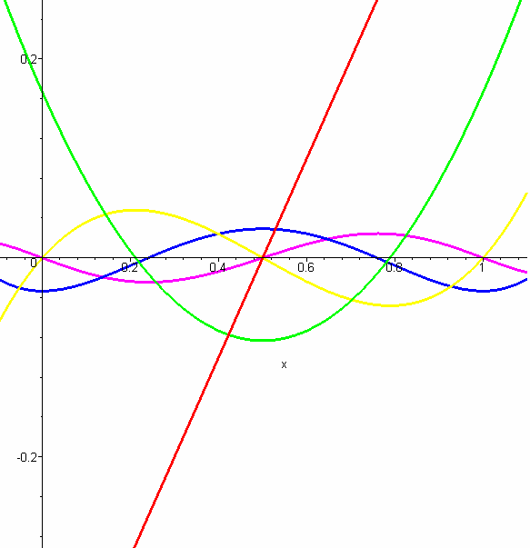 Բեռնուլիի բազմանդամի գրաֆիկ